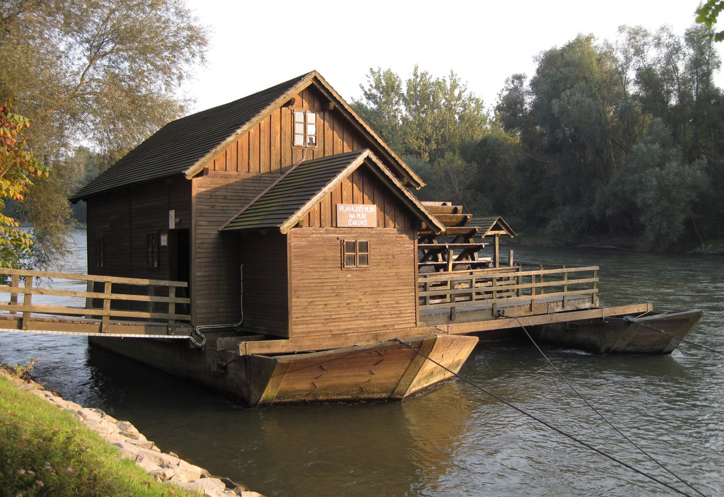 Mlin na Muri. Ižakovci. Otok ljubezni